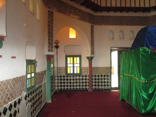 Interieur Mausolée Sidi Ahmed Benyoucef Miliana Algérie